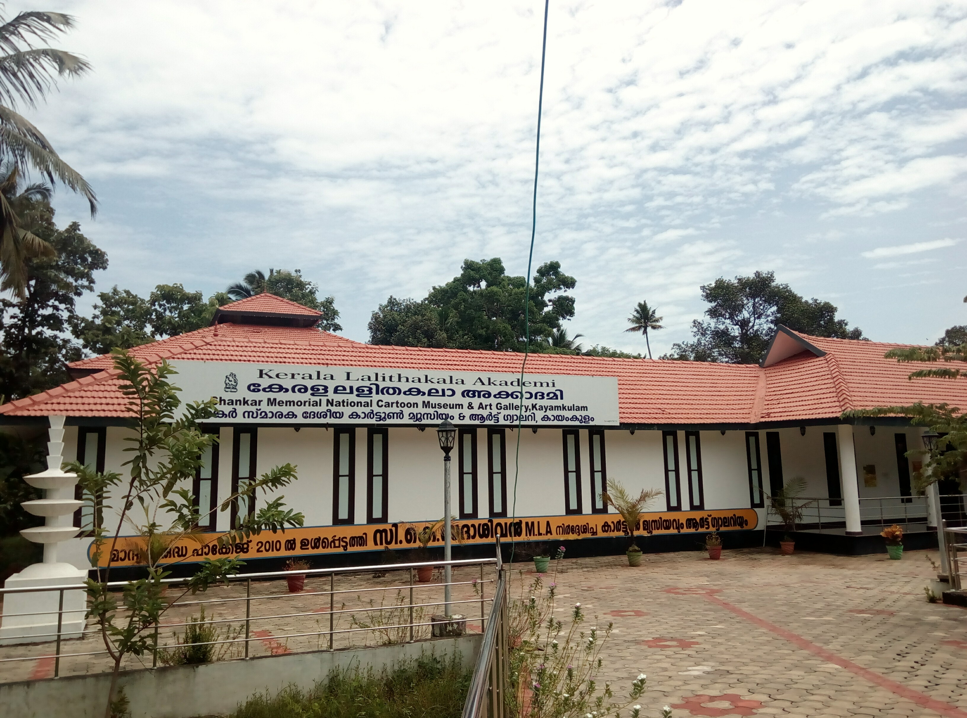 Sankar Memorial National Cartoon Museum, Kayamkulam